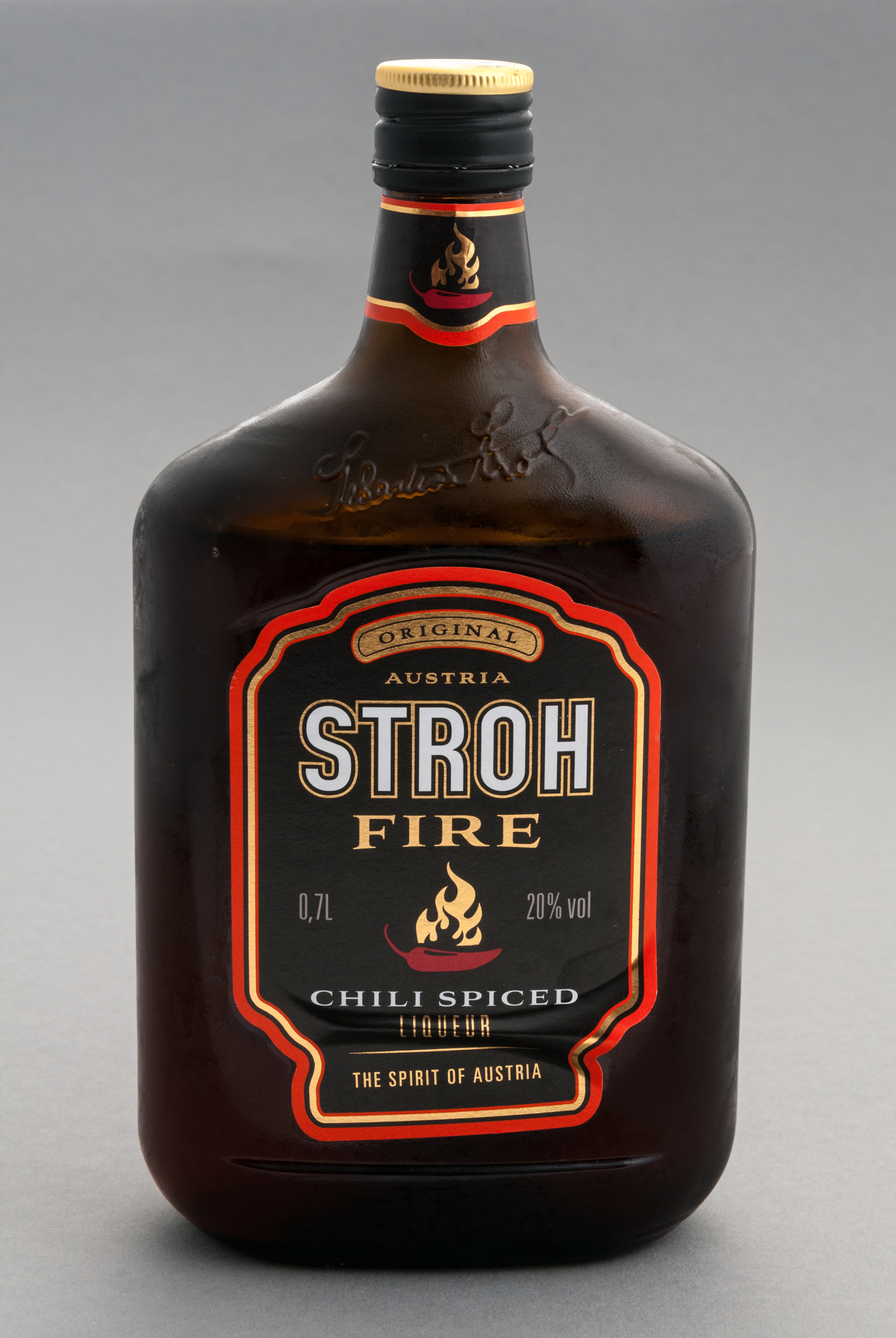 Flasche stroh Rum